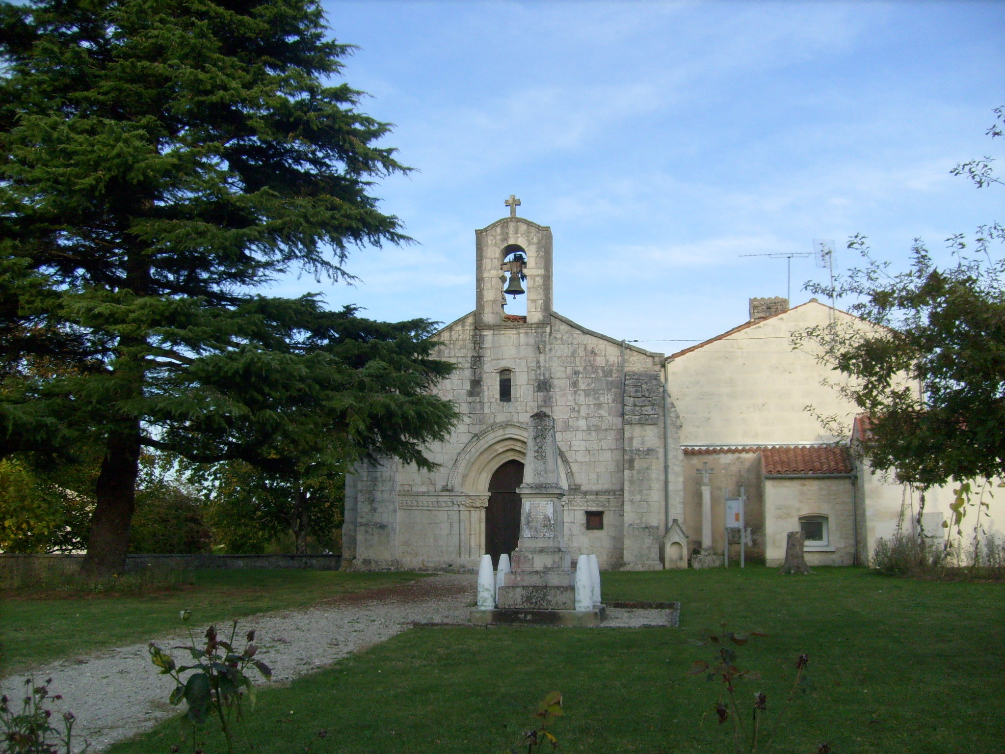 Eglise de Pessines